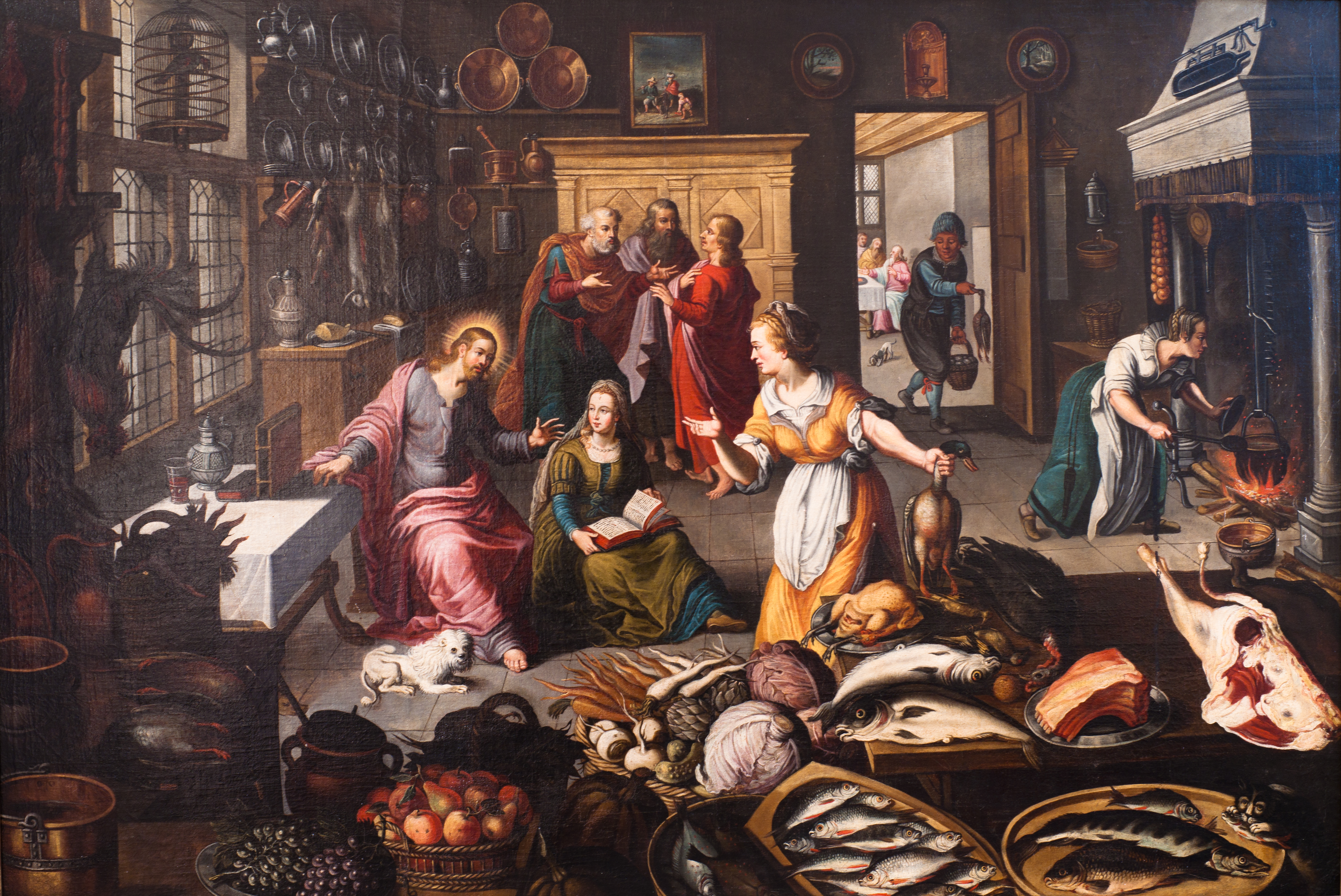 Scène religieuse dans un environnement domestique de cuisine